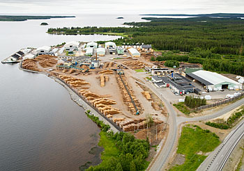 Kåge såg, Norra Skogsägarnas träindustri.